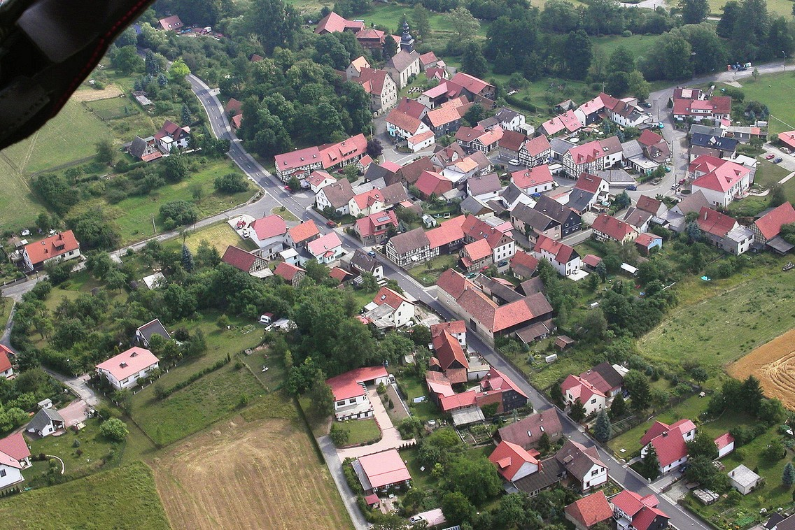 Luftbild Ellingshausen in Thüringen